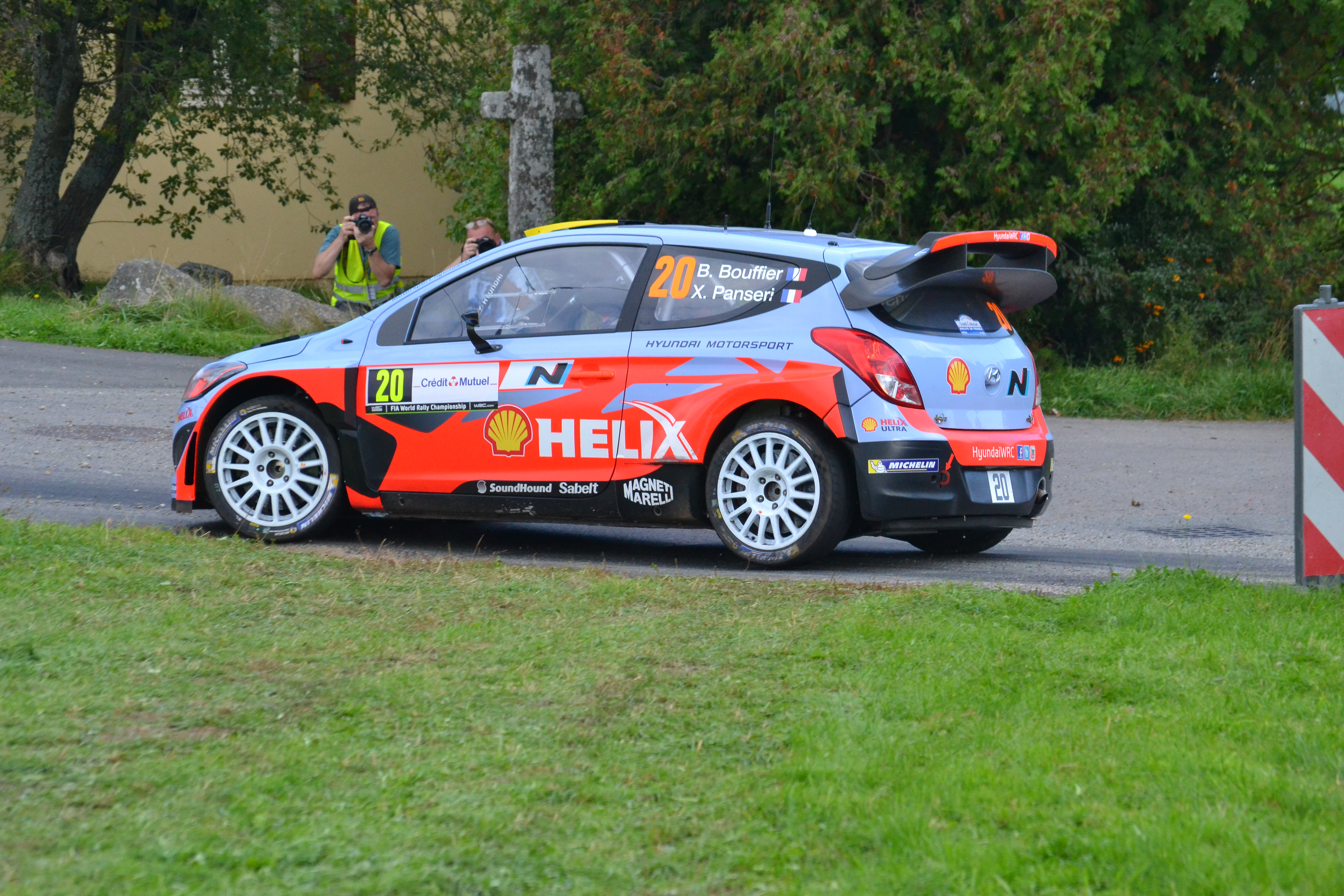 Rallye WRC France-Alsace 2014, ES12 Soultzeren - Le Grand Hohnack 2 à Labaroche. Hyundai i20 WRC - Bryan Bouffier - Xavier Panseri